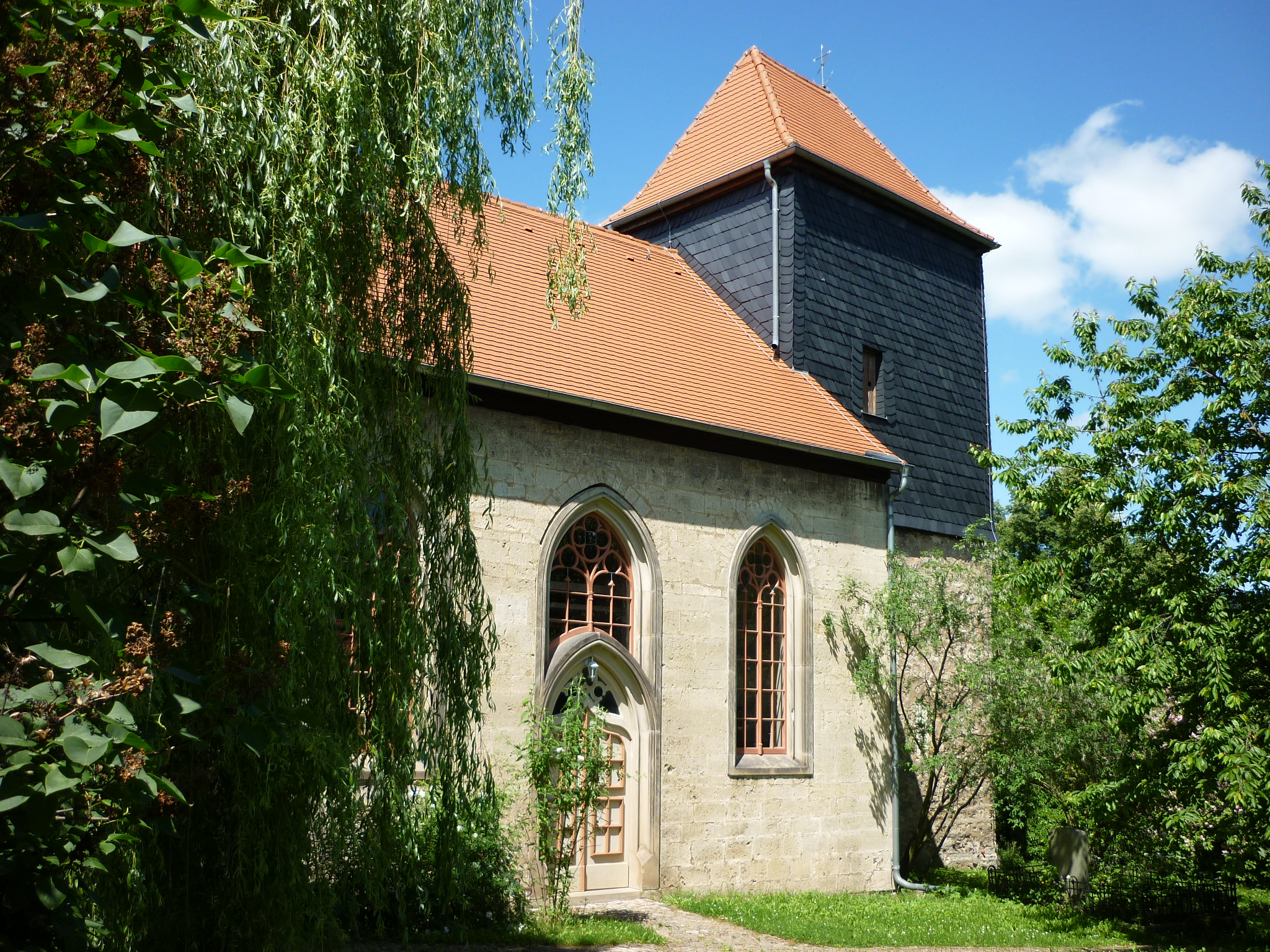 Kirche von Jenaprießnitz (Ortsteil von Jena)